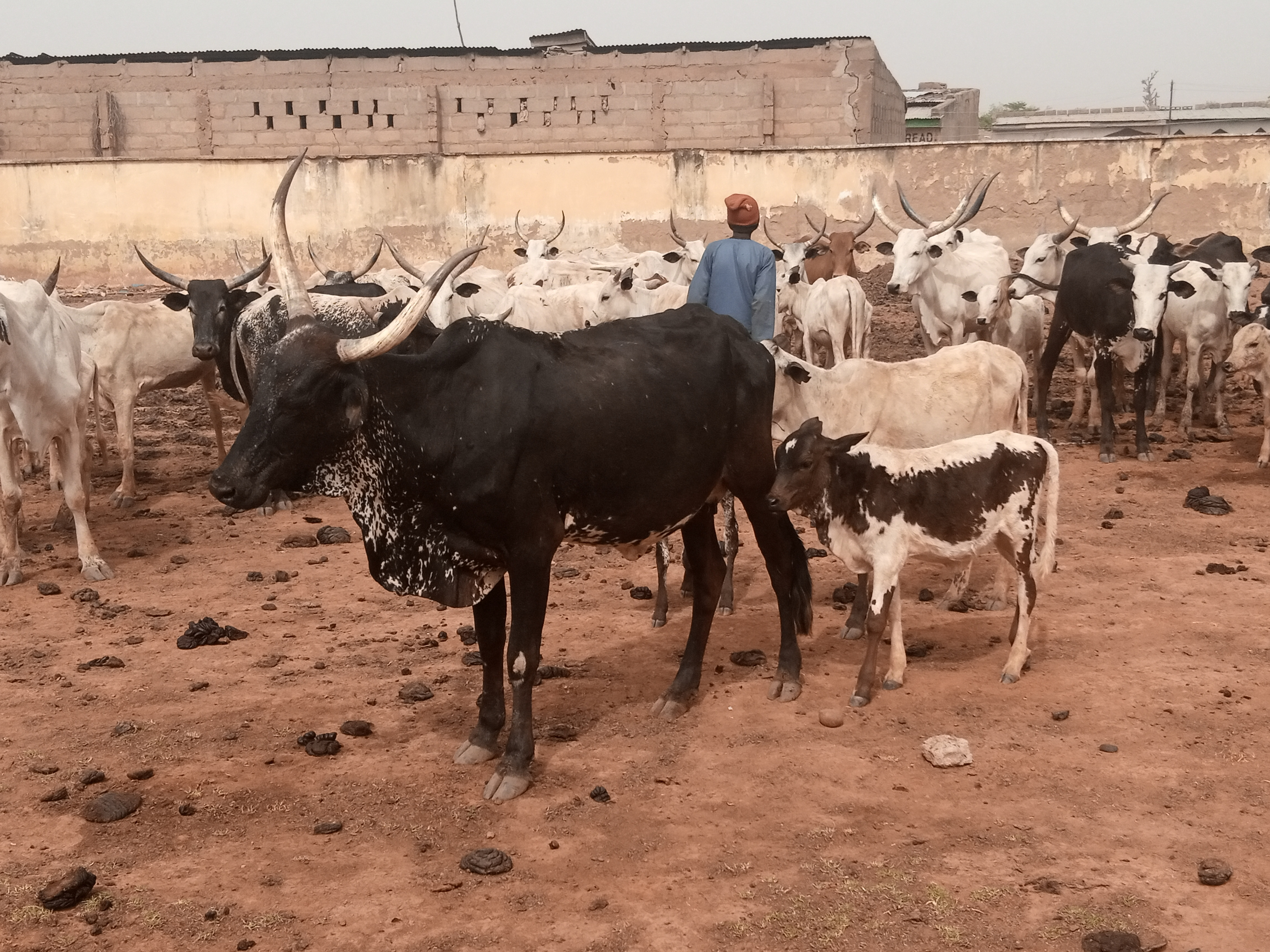 Hausa: Saniya a wurin kiwo